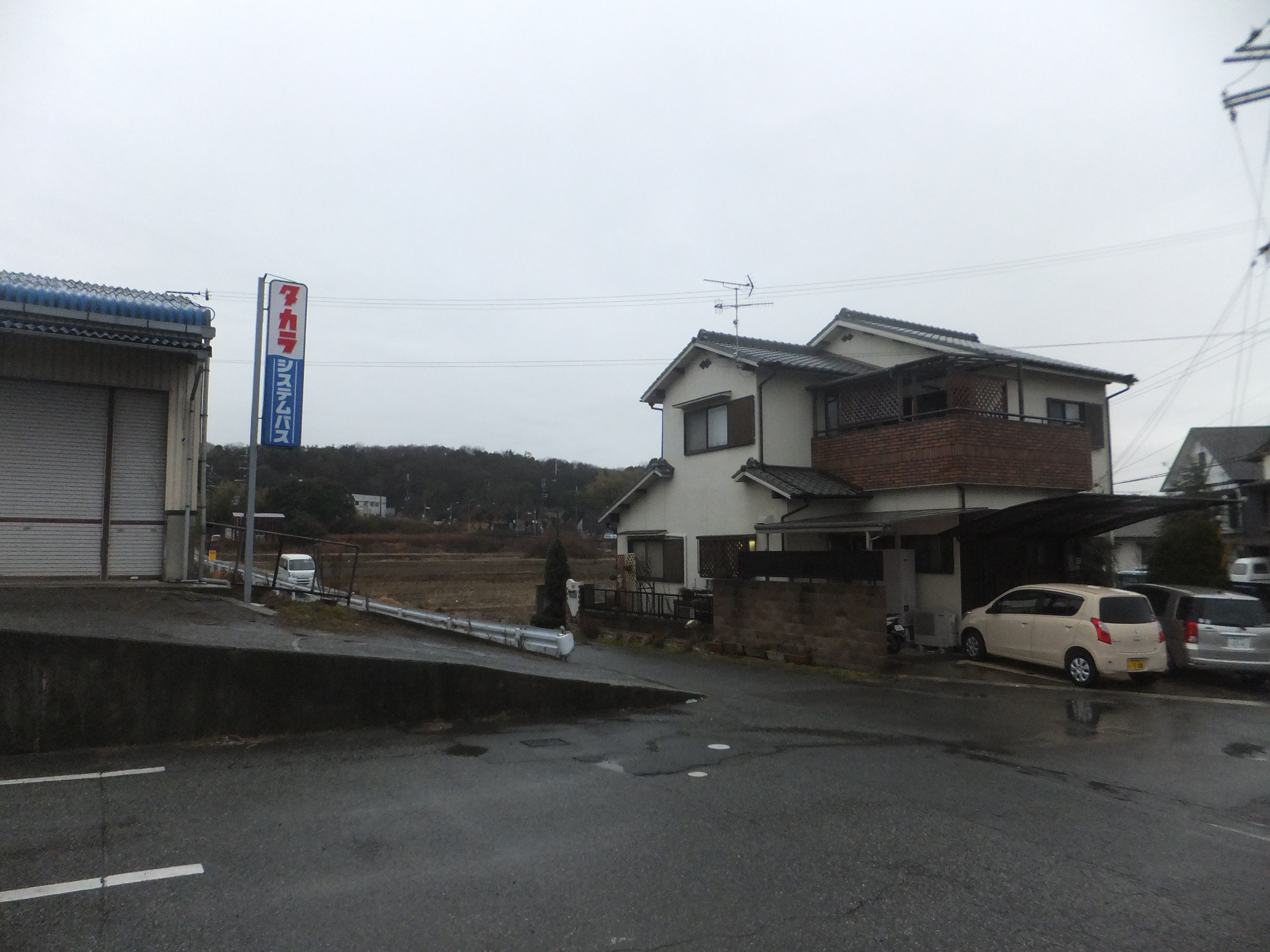 兵庫県三木市別所町花尻